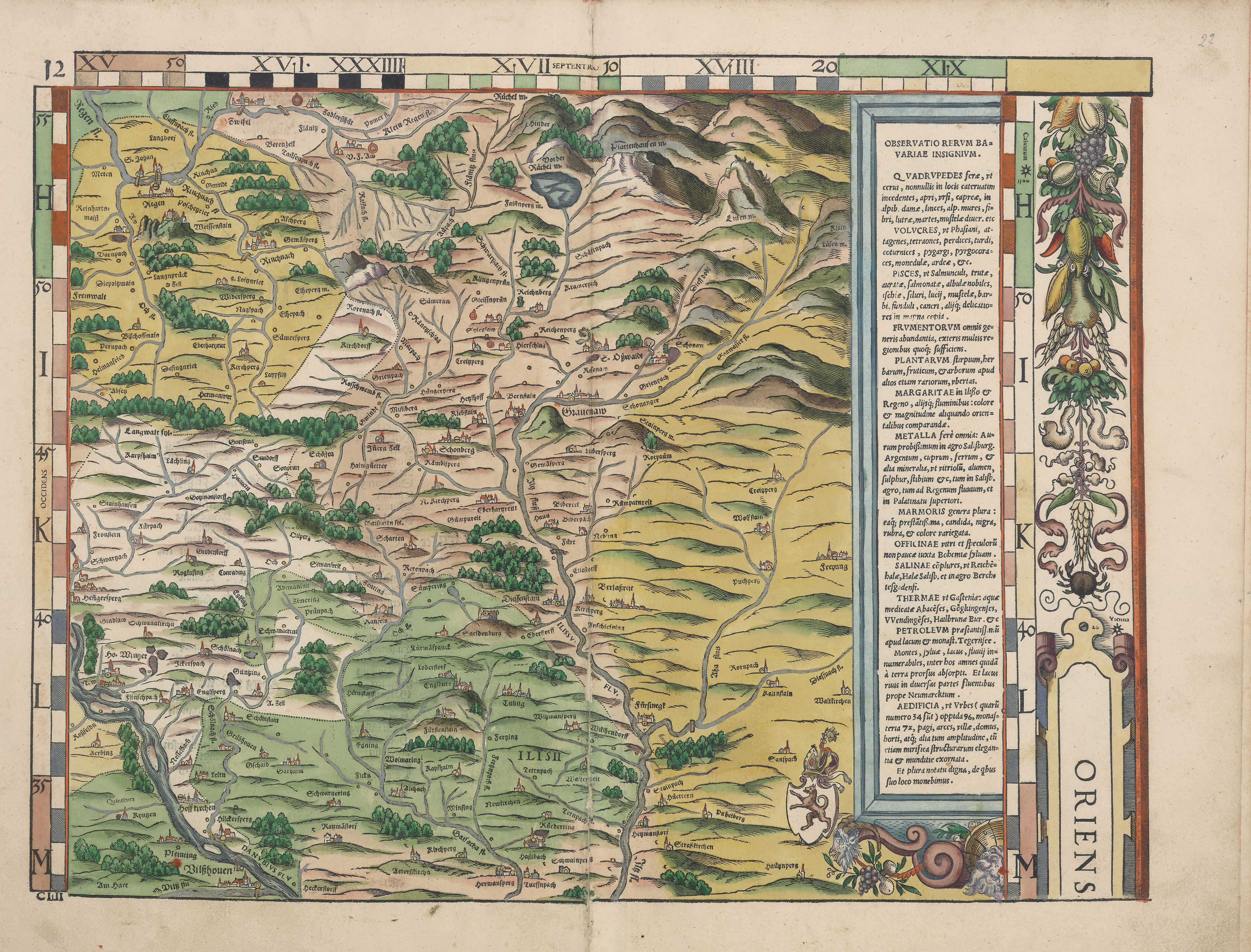 Philipp Apian - Bairische Landtafeln von 1568 (Tafel 12) ca. 1:140.000, Gesamtgröße des Originals 156 x 159 cm, je Blatt 43 x 33 cm Auf der Basis der „Großen Karte“ ließ Philipp Apian 1566 von Jost Amman Holzschnitte im kleineren Maßstab von 1:144.000 anfertigen. Diese so genannten Bairischen Landtafeln, aufgeteilt in 24 Holzschnitte, verlegte Apian in seiner eigenen Druckerei. Die Genauigkeit der Landkarten wurde erst im 19. Jahrhundert übertroffen. Noch Napoleon benutzte sie für den Einmarsch in Bayern. Ein Originaldruck der Karte ist im Stadtmuseum Ingolstadt ausgestellt, die Druckstöcke befinden sich heute im Bayerischen Nationalmuseum in München. Abraham Ortelius verbreitete kolorierte Kupferstiche dieser Landtafeln in Buchform „ex tabula Philippi Apiani“.